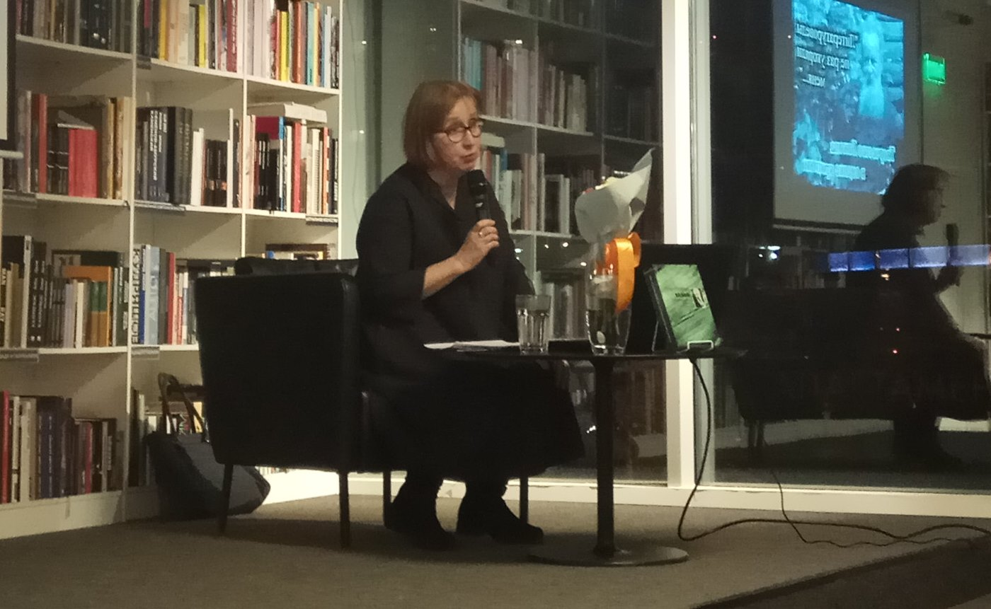 Литературовед Мария Литовская